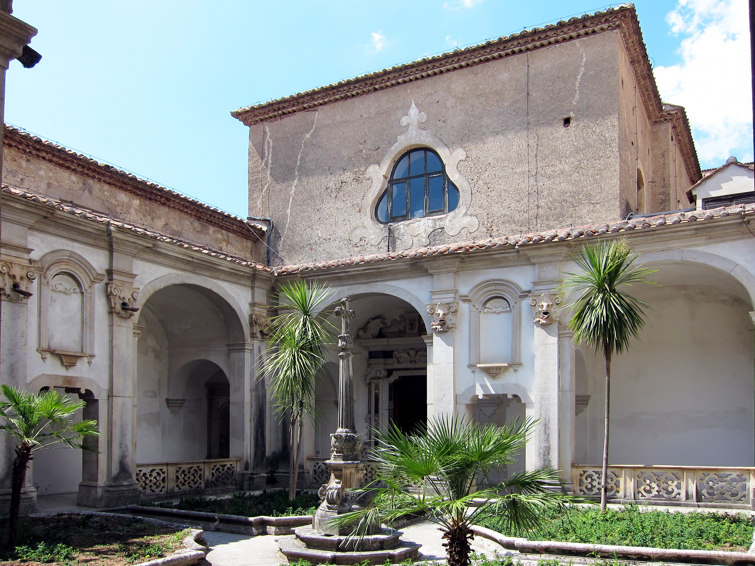 Patio dans la Certosa di San Lorenzo (Padula).